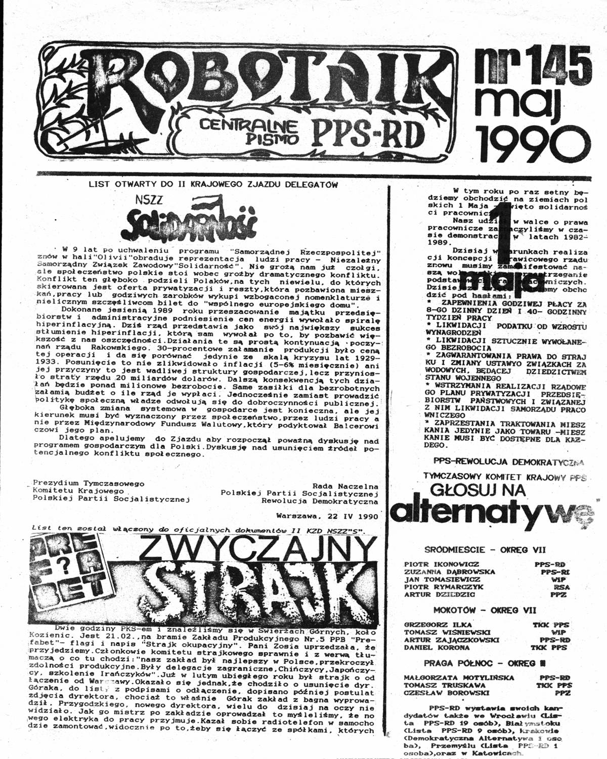 Robotnik. Pismo nielegalnej PPS - RD